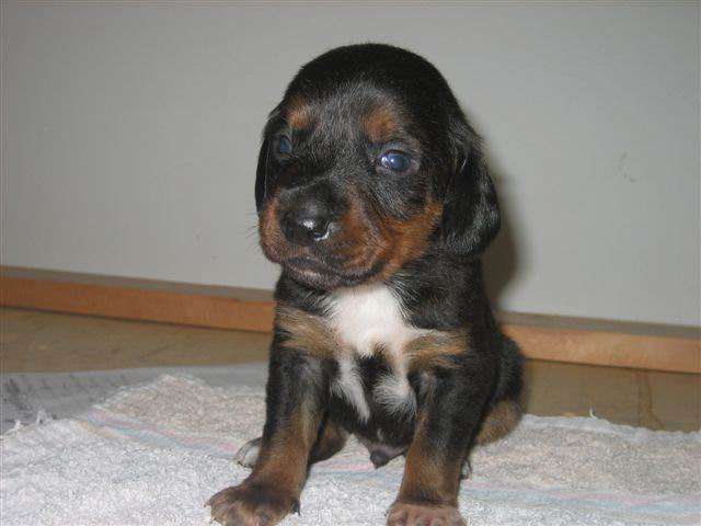 Tiroler Bracke (schwarz-roter Schlag), Welpe (3 Wochen alt)